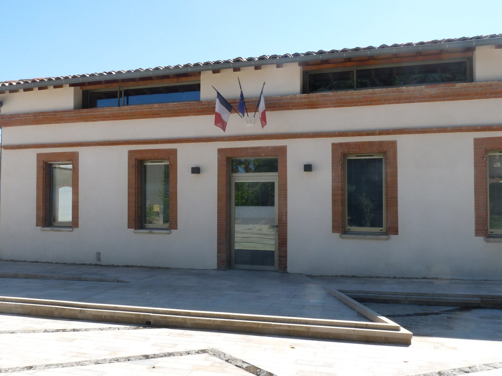 Mairie de Préserville, Haute-Garonne, France